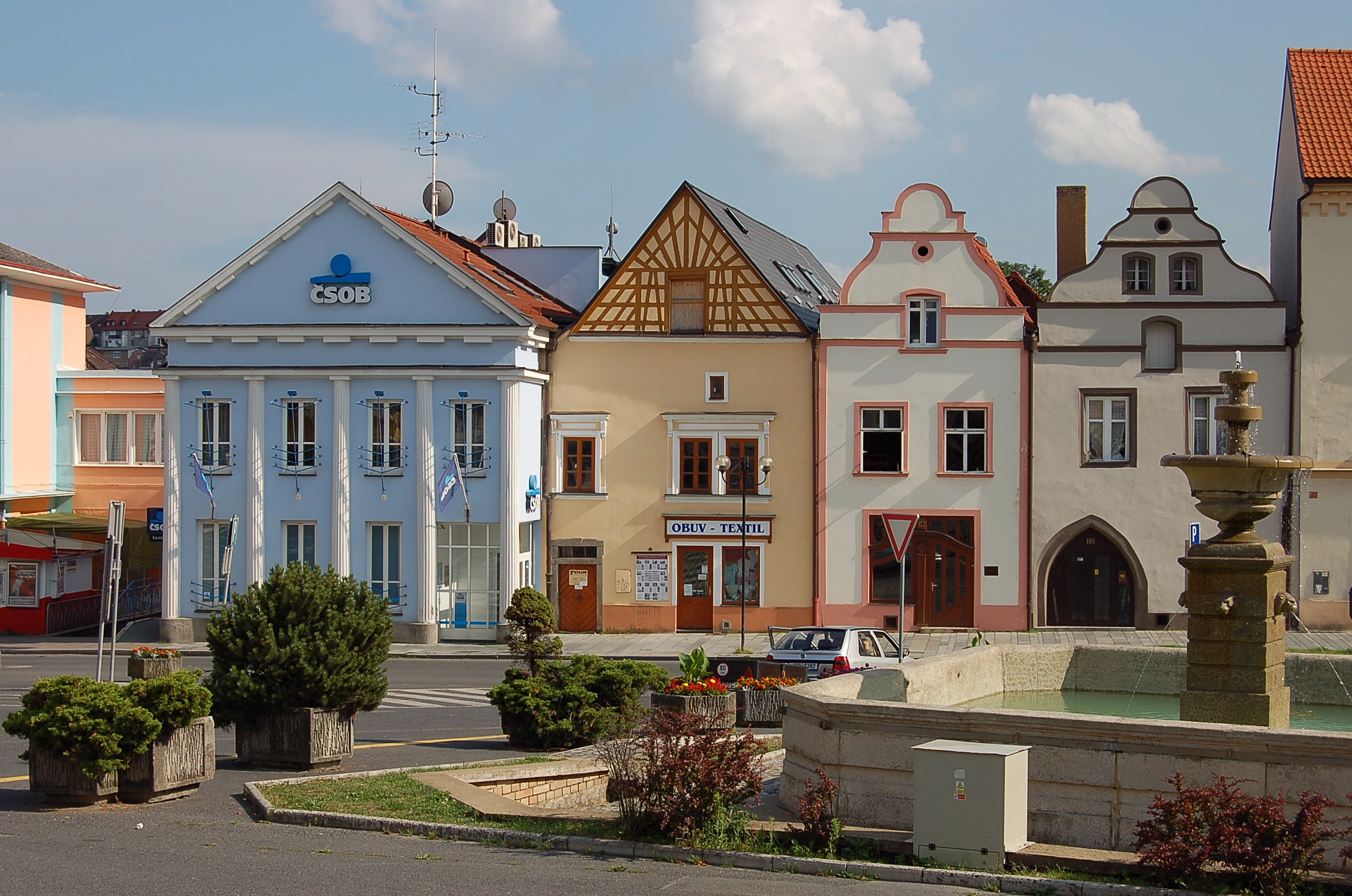 Tachov-Häuser am Marktplatz